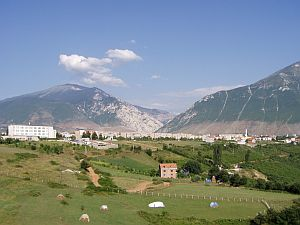 Kukës (Albania)